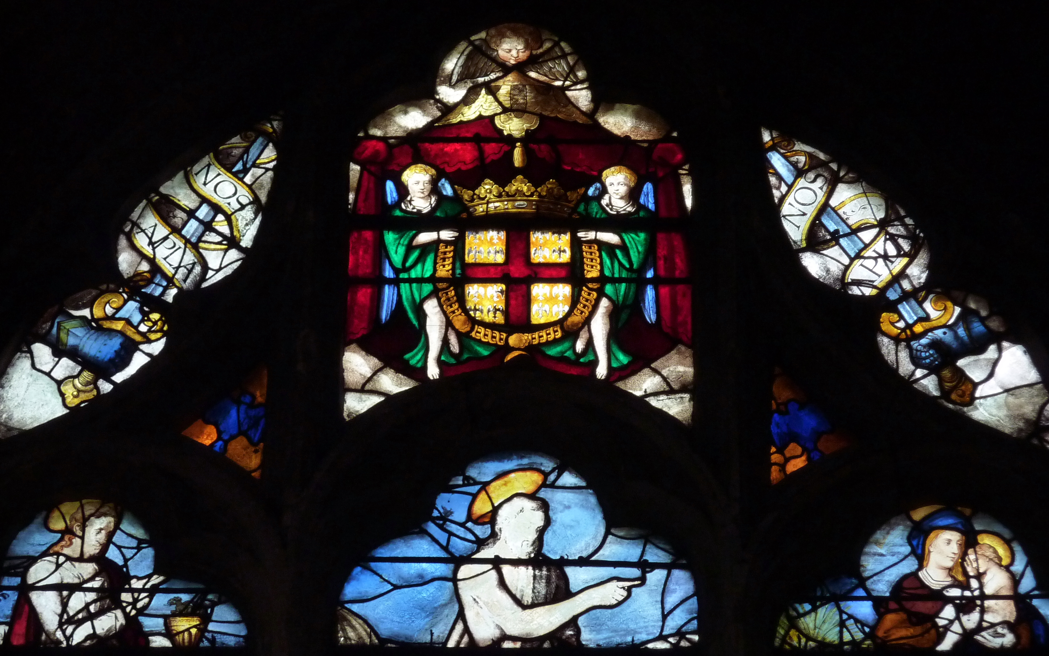 Ausschnitt eines Bleiglasfensters Nr. 13 (von 1563) in der katholischen Pfarrkirche Saint-Martin (Collégiale Saint-Martin) in Montmorency, Darstellung: Wappen und Wahlspruch (APLANOS) von Anne de Montmorency (siehe: Dominique Foussard, Charles Huet, Mathieu Lours: Églises du Val-d'Oise. Pays de France, Vallée de Montmorency, Société d'Histoire et d'Archéologie de Gonesse et du Pays de France, 2. Auflage, Gonesse 2011, ISBN 9782953155426)